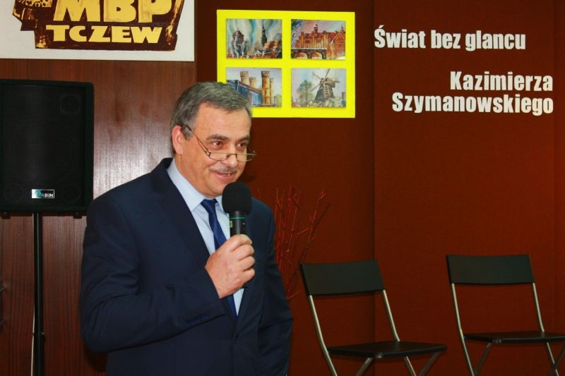 Promocja tomiku poezji „Świat bez glancu” Kazimierza Szymanowskiego, laureata nagrody Kociewskie Pióro 2014 i prywatnie kierowcy w Urzędzie Miejskim w Tczewie.